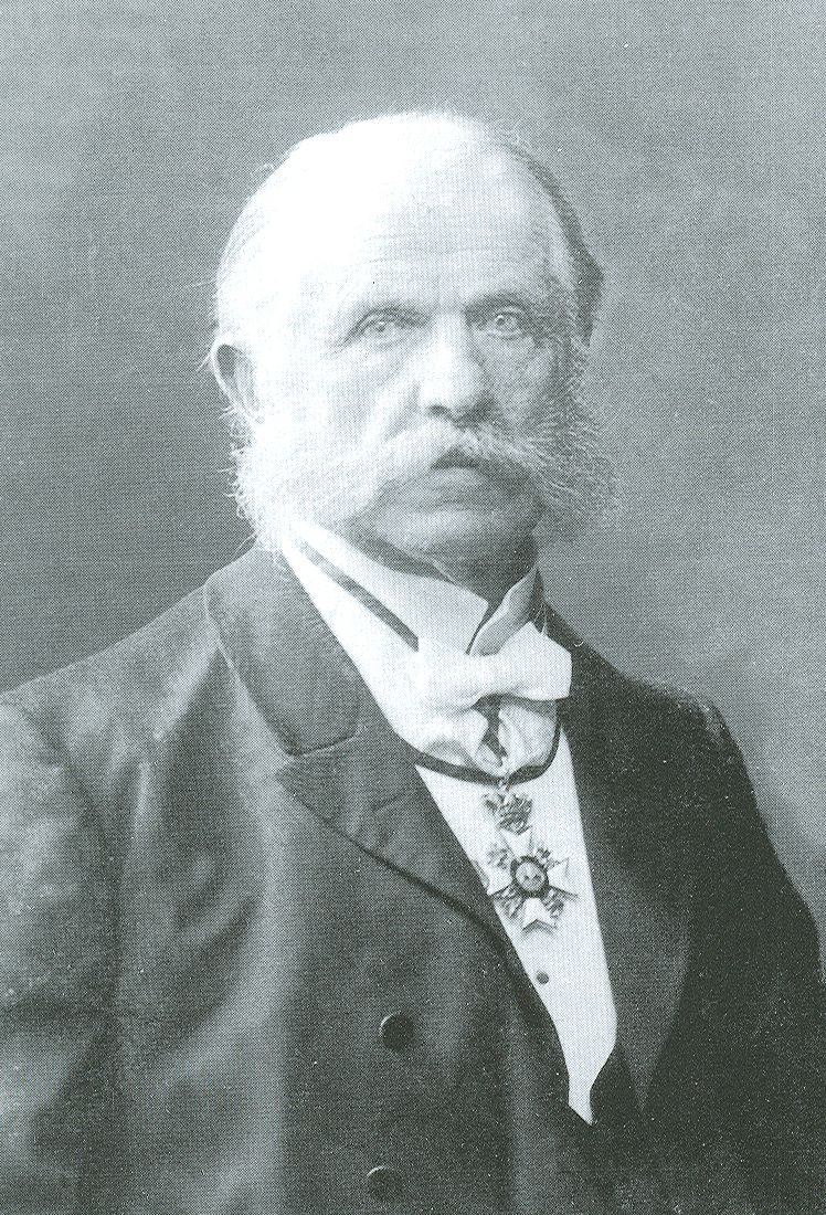 Portret van de Officier van Justitie Ie Klasse Herman Friedrich Theodor Götze in Neustrelitz. Hij draagt de versierselen van de Orde van de Kroon van de Wenden die hij in 1910 ontving.